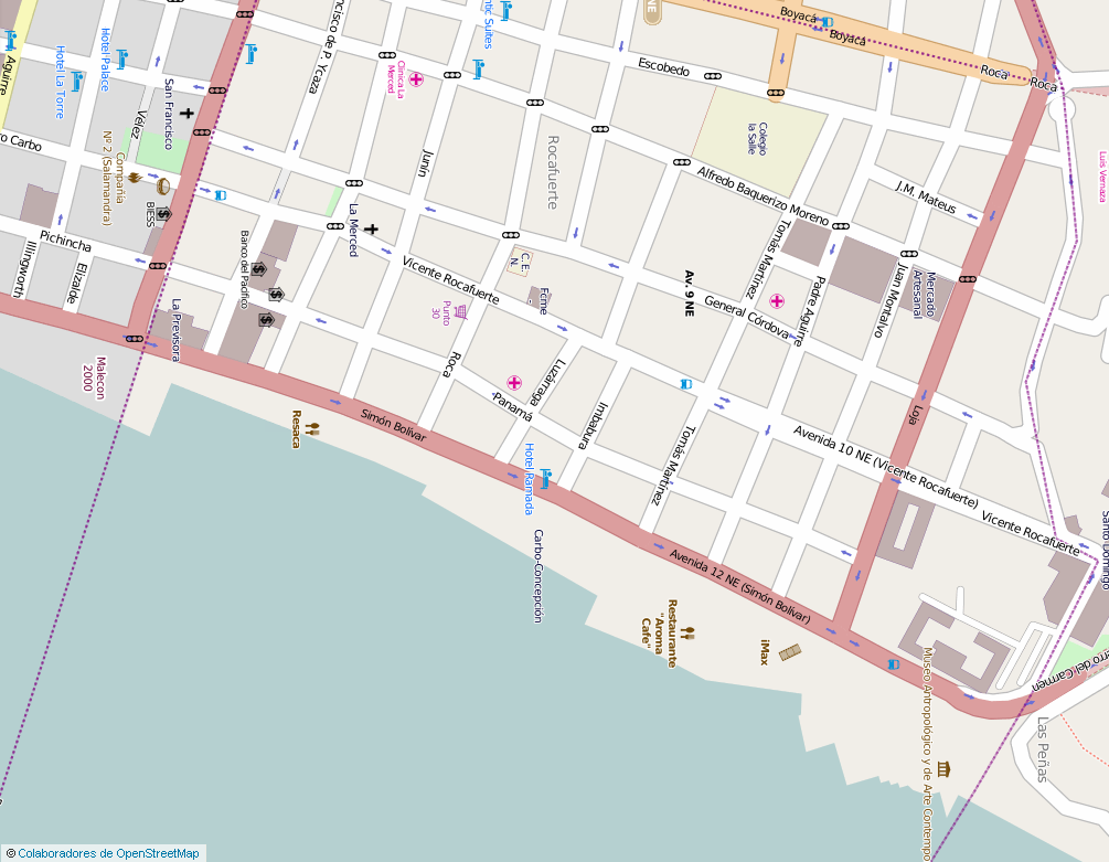 OpenStreetMap - Plano de parte del centro de Guayaquil hacia el noreste.